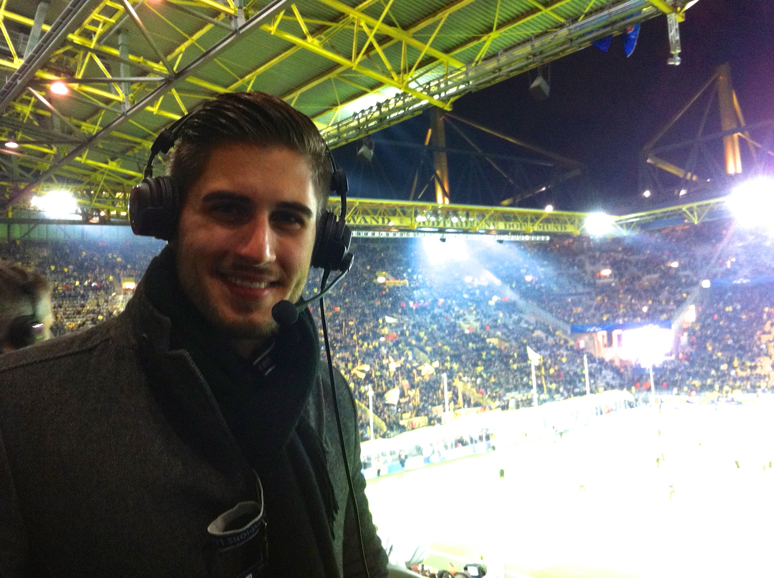 Champions League 2013